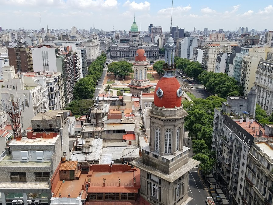 Sitio: congreso